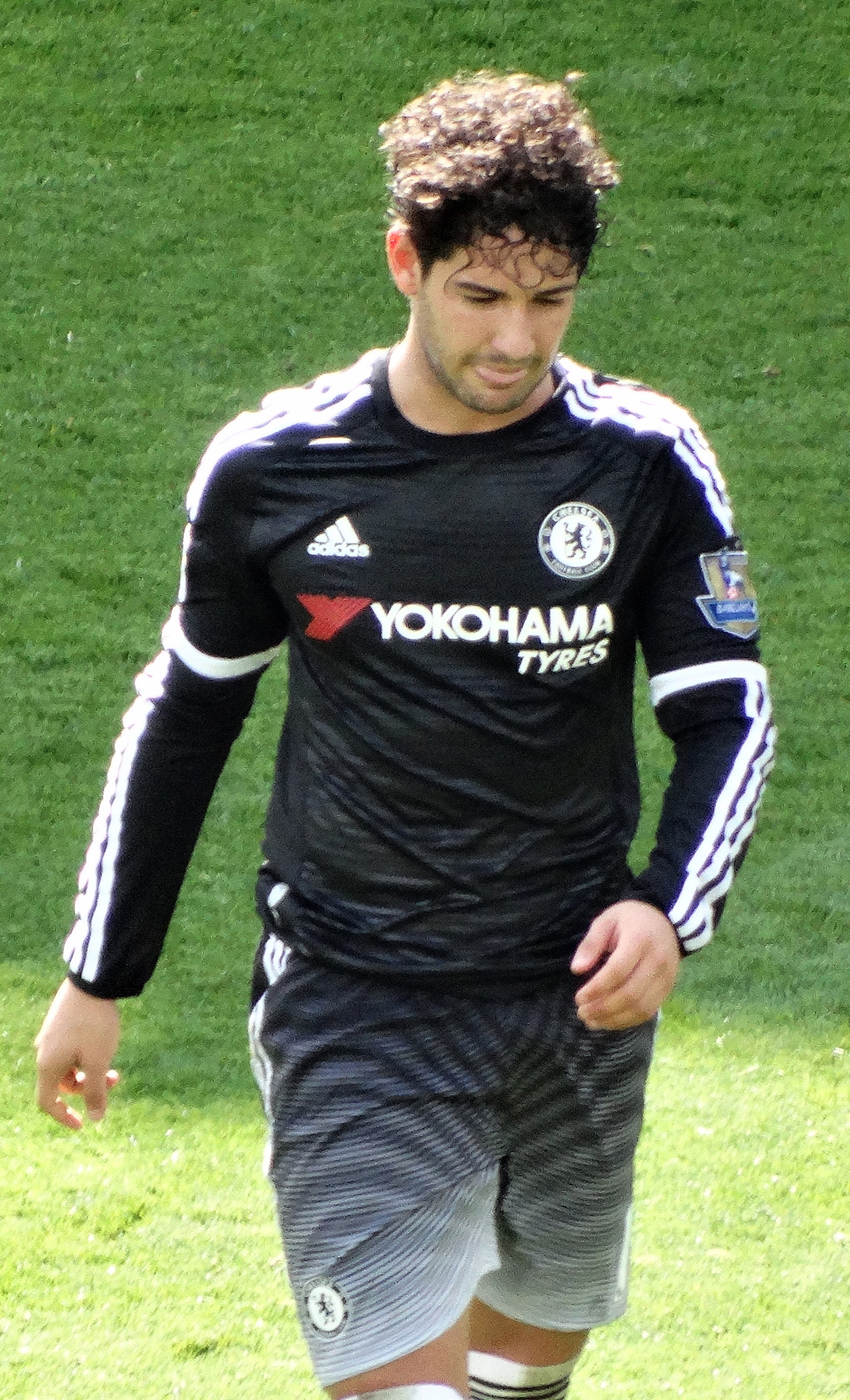 Aston Villa 0:4 Chelsea